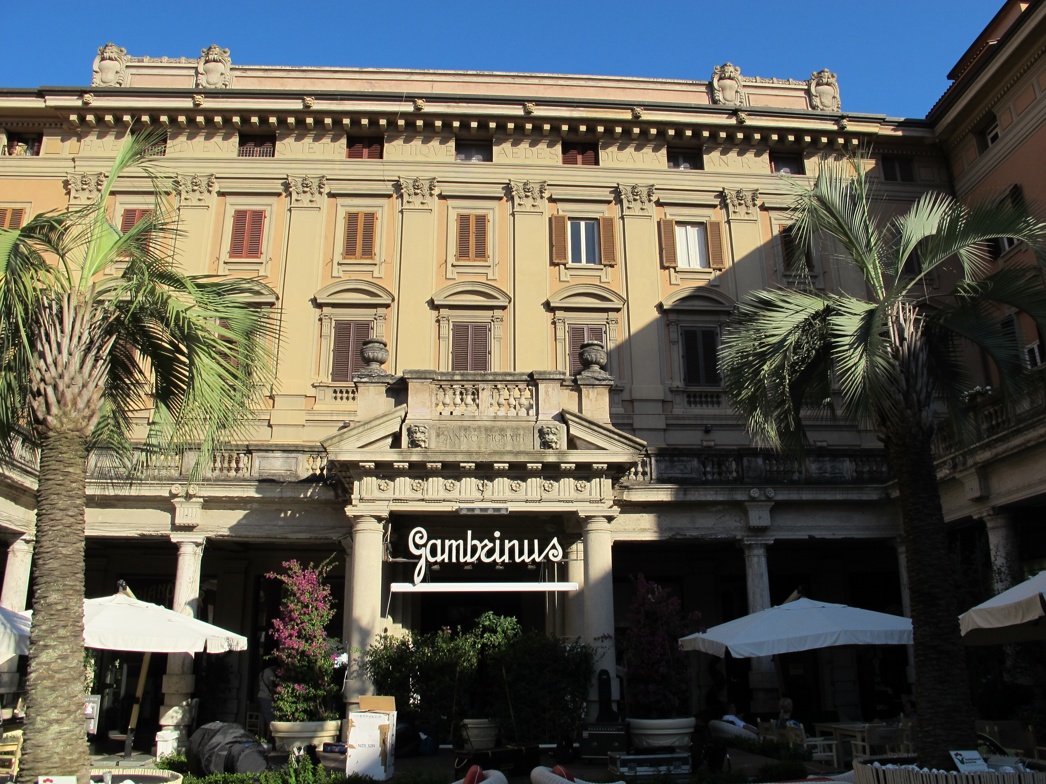 Portico gambrinus